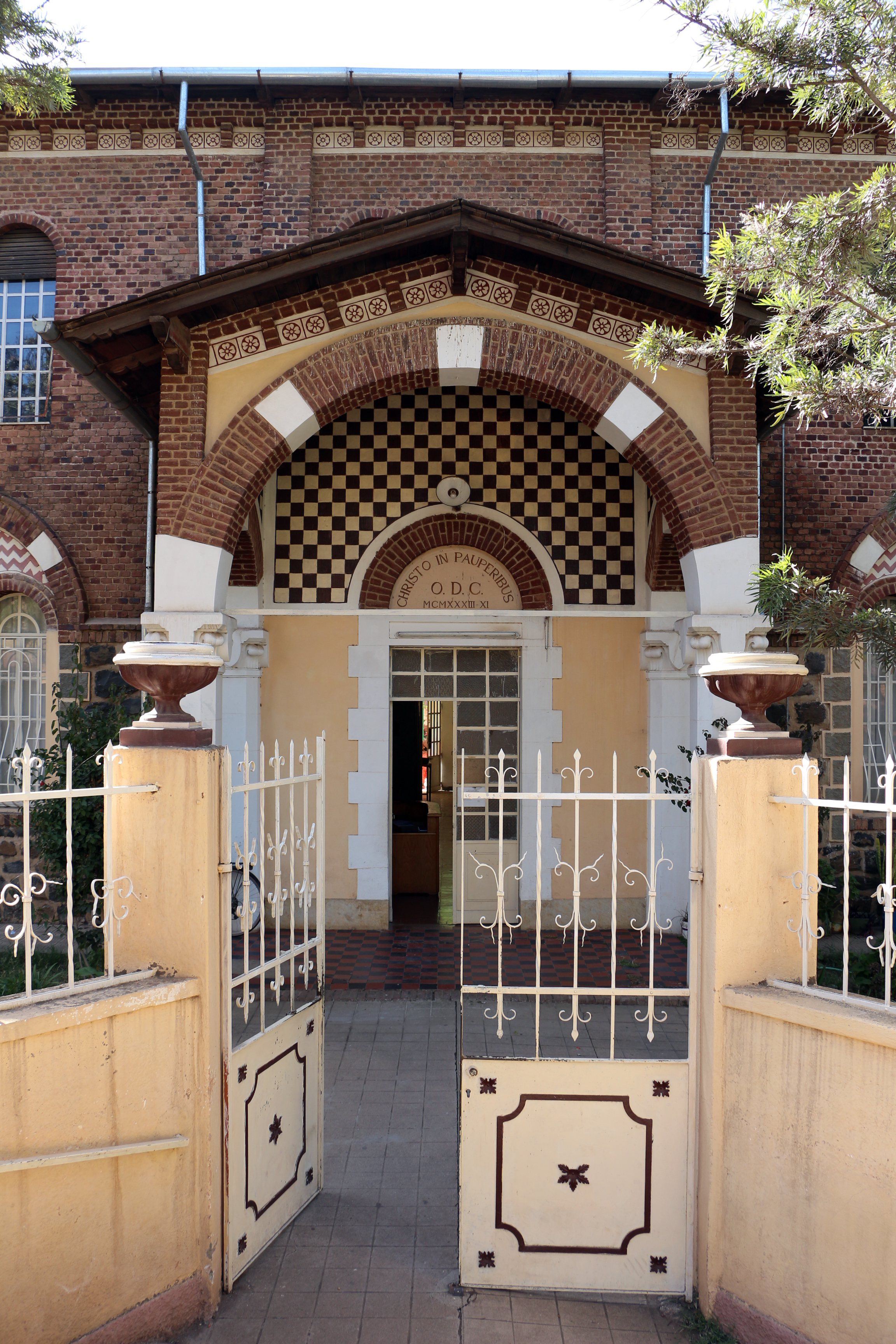 Asmara, museo nazionale, ingresso.JPG